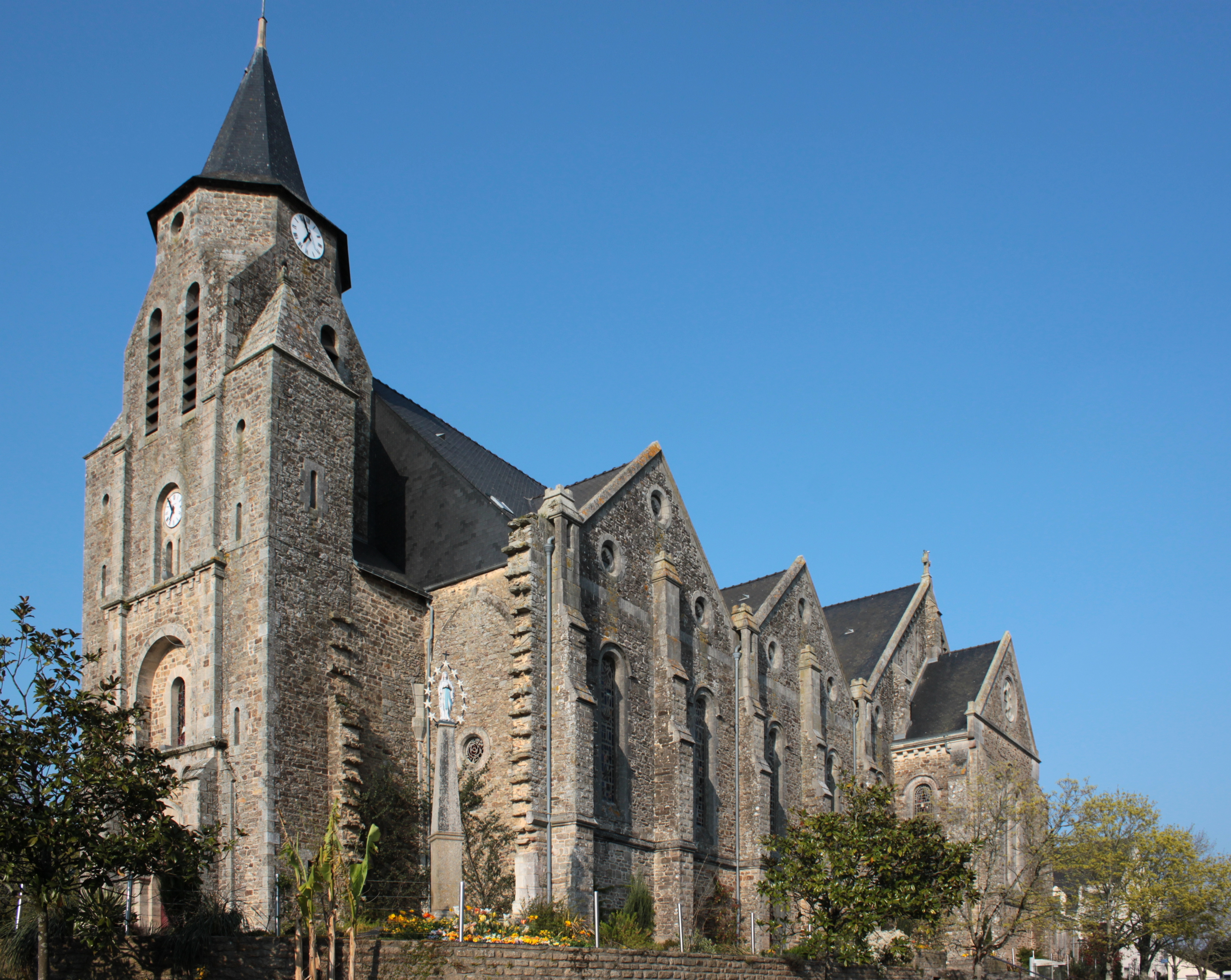 Église Saint-Pierre-Saint-Paul, Fr-56-Nivillac.